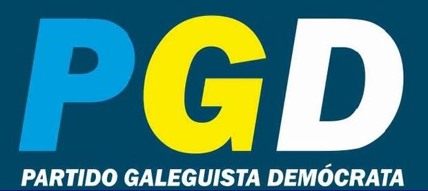 Logo do PGD (2014).